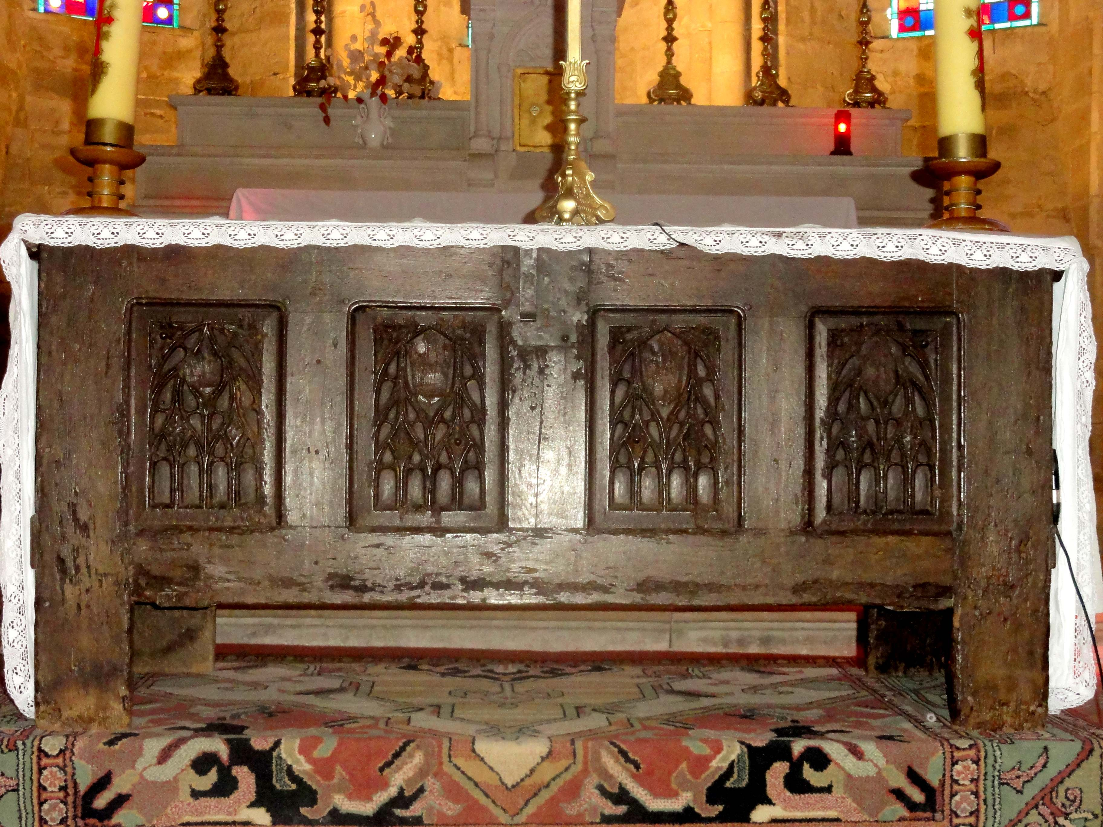 Maître-autel (ancien coffre).